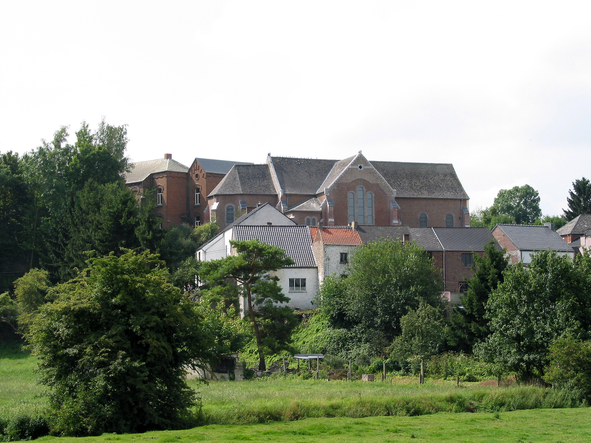 Boignée (Belgique), le quartier de l'église.